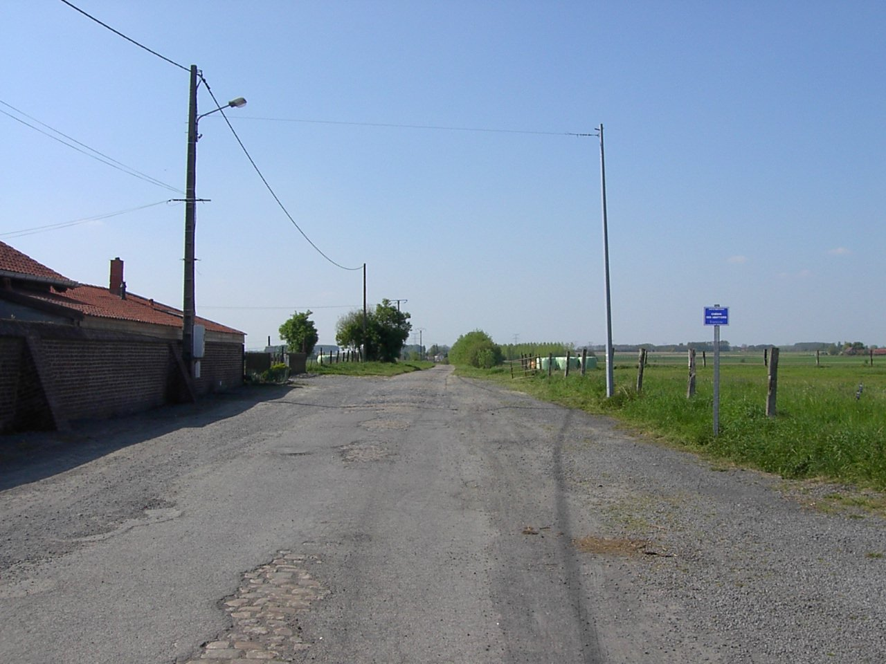 Fin du secteur pavé d'Orchies (France)